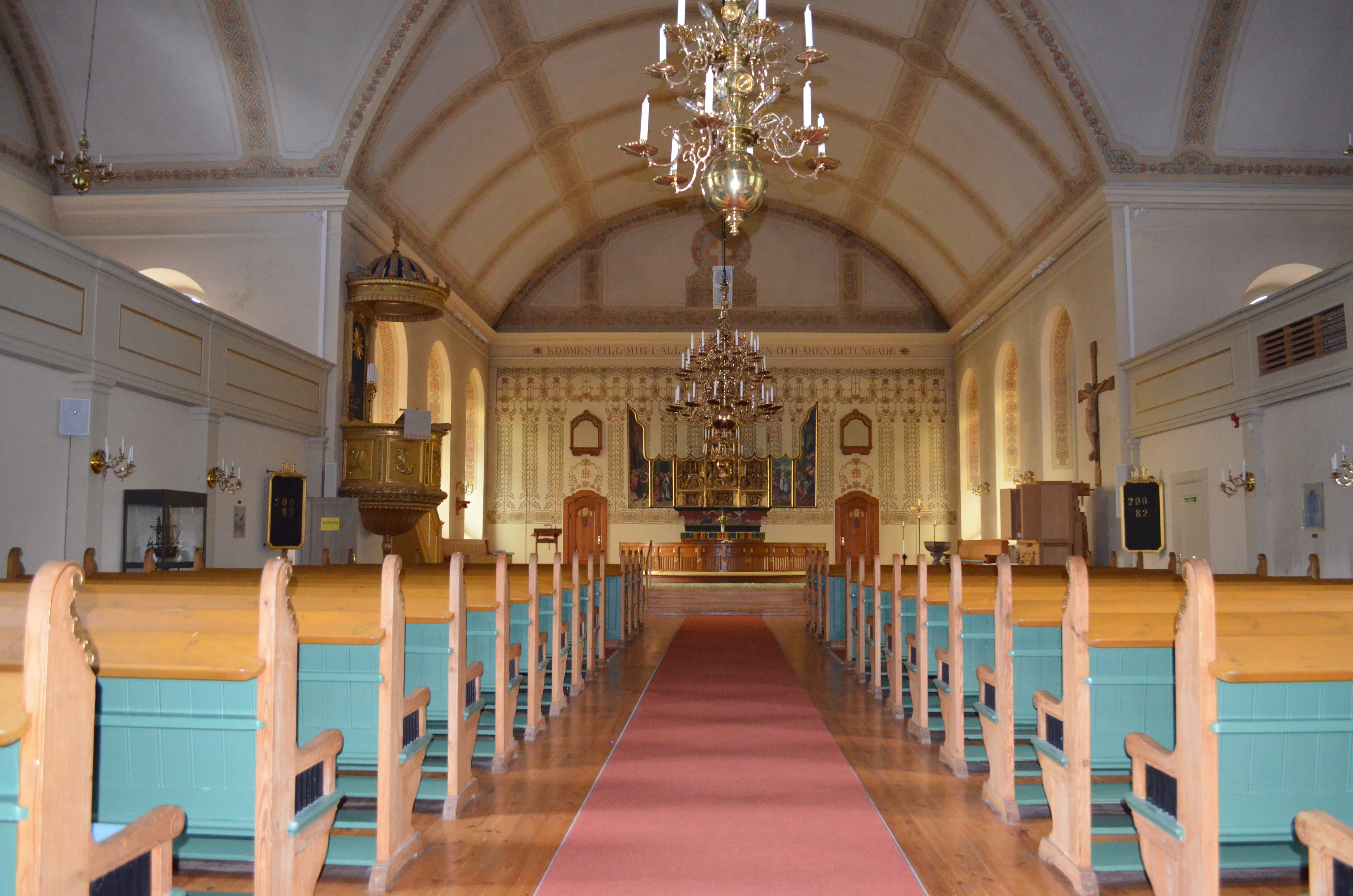 Kyrkosal.